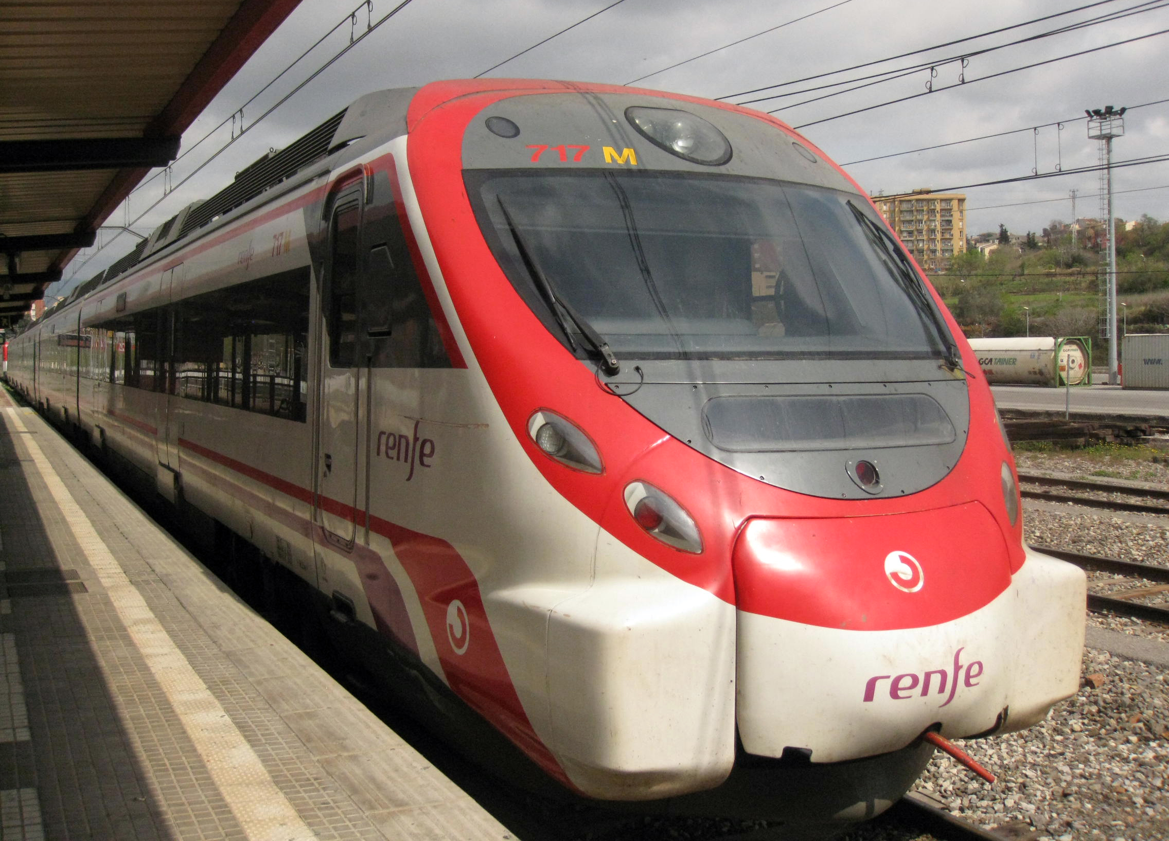 Tren a l'estació de Granollers Centre